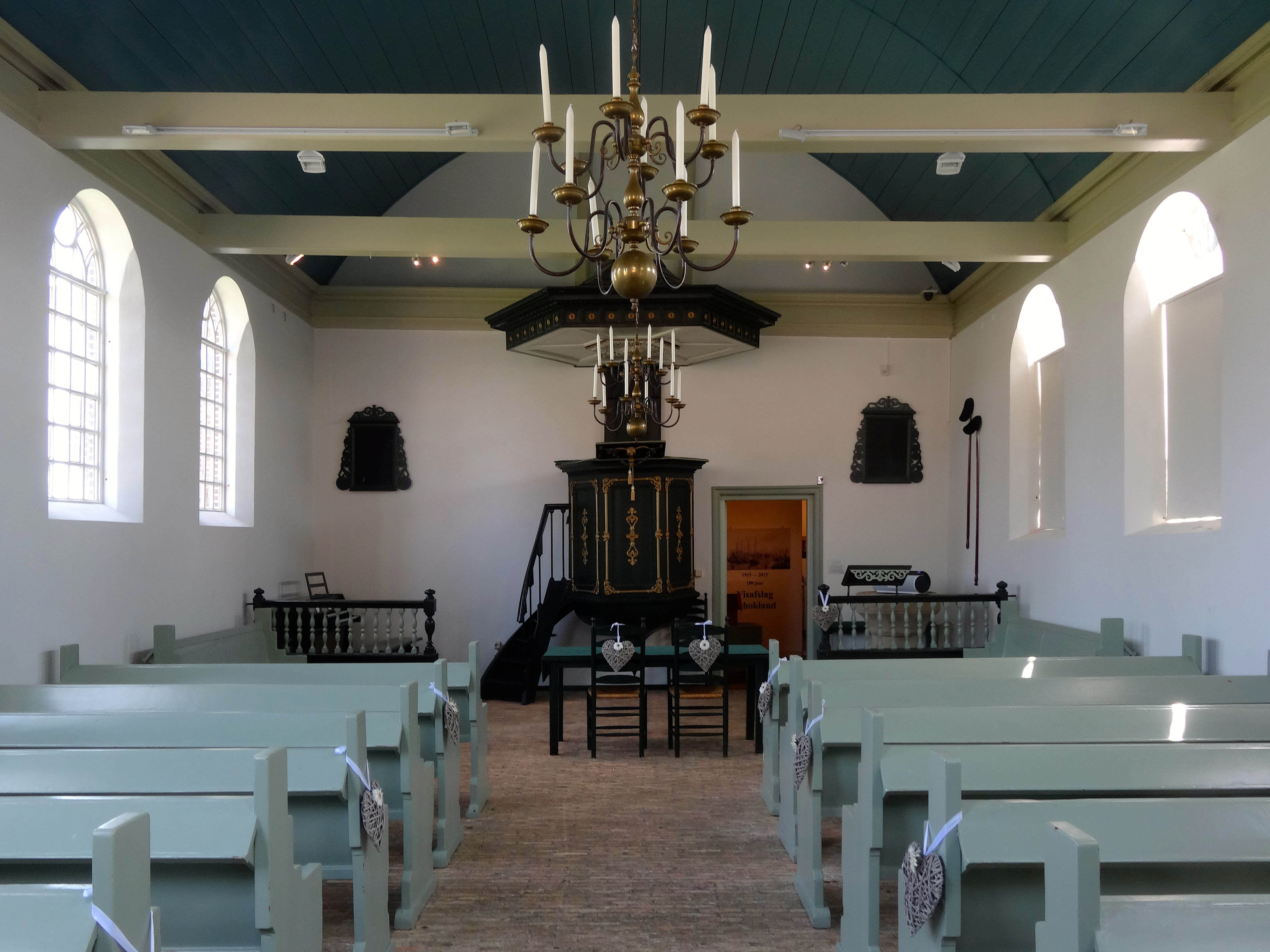 Interieur van de Enserkerk Middelbuurt Schokland